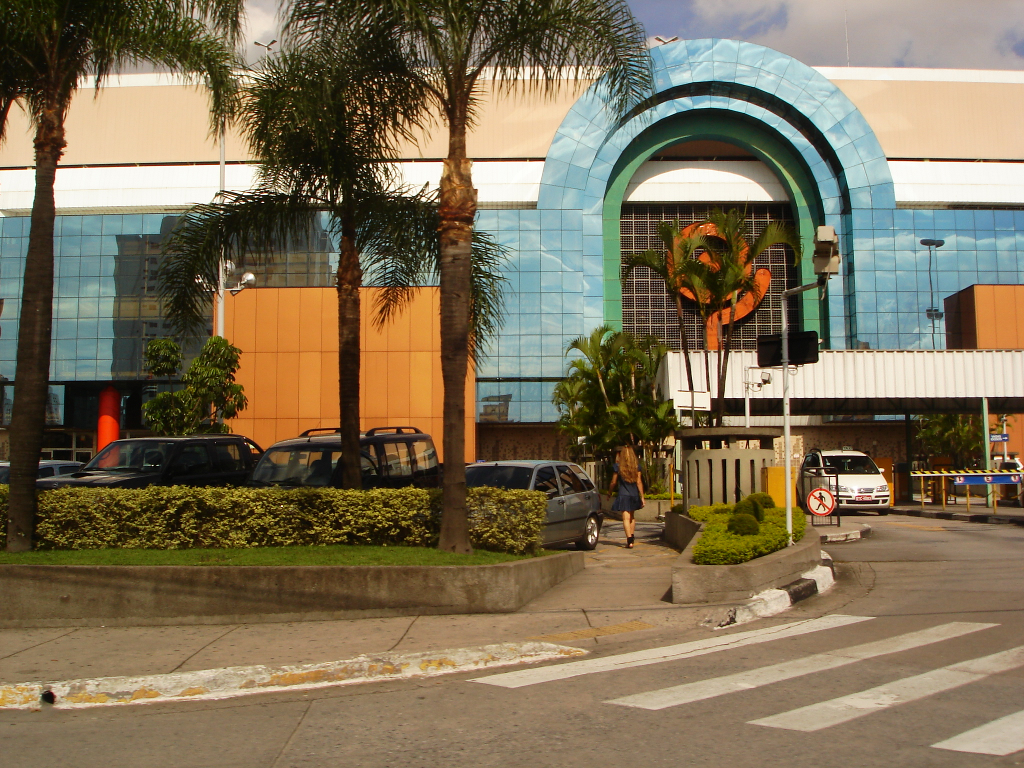 Shopping Ibirapuera